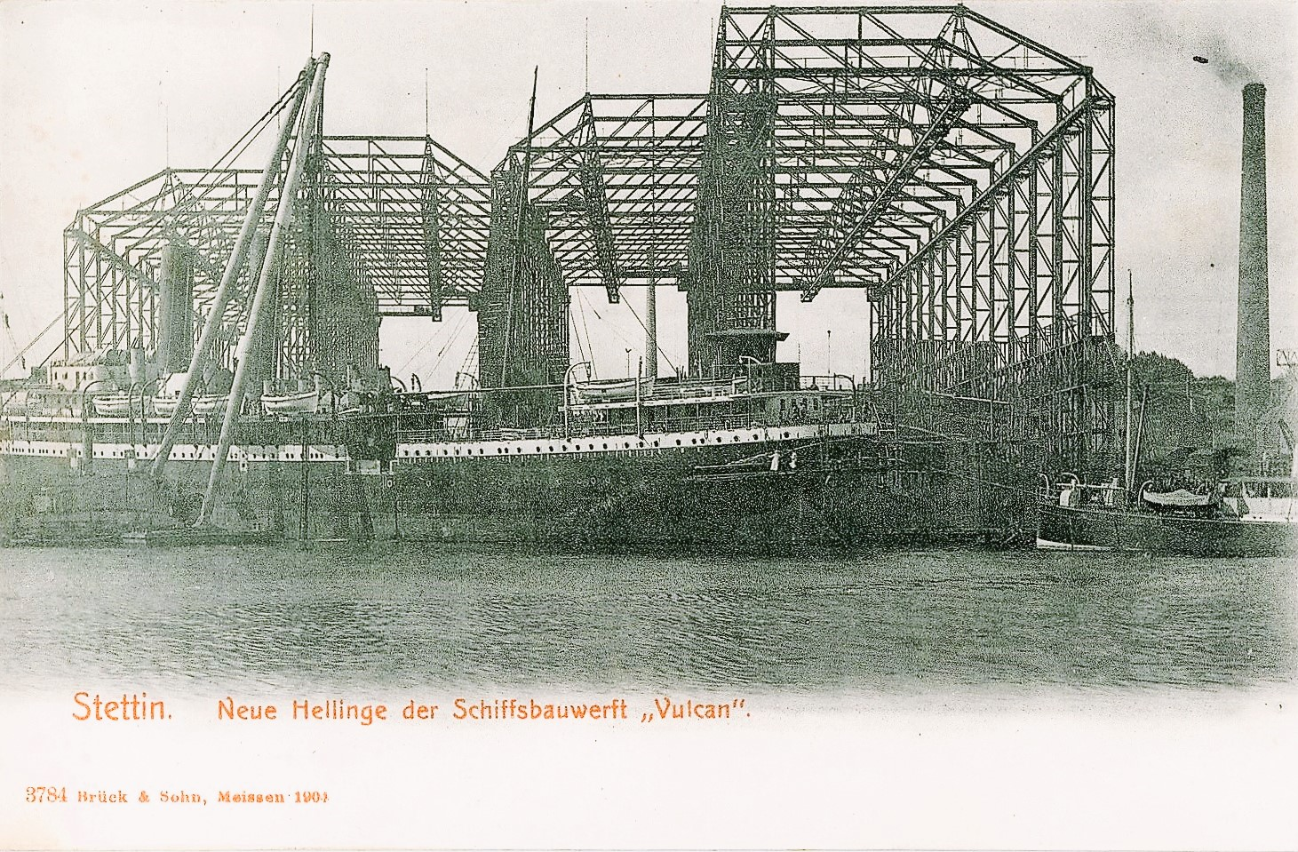 Stettin; Neue Hellinge der Schiffsbauwerft Vulcan mit Dampfer This postcard is from publisher Brück & Sohn in Meißen ( This postcard has a unique number 03784 and is available in a higher resolution at the publisher. This images was uploaded in a cooperation project between Wikipedians and the publisher.